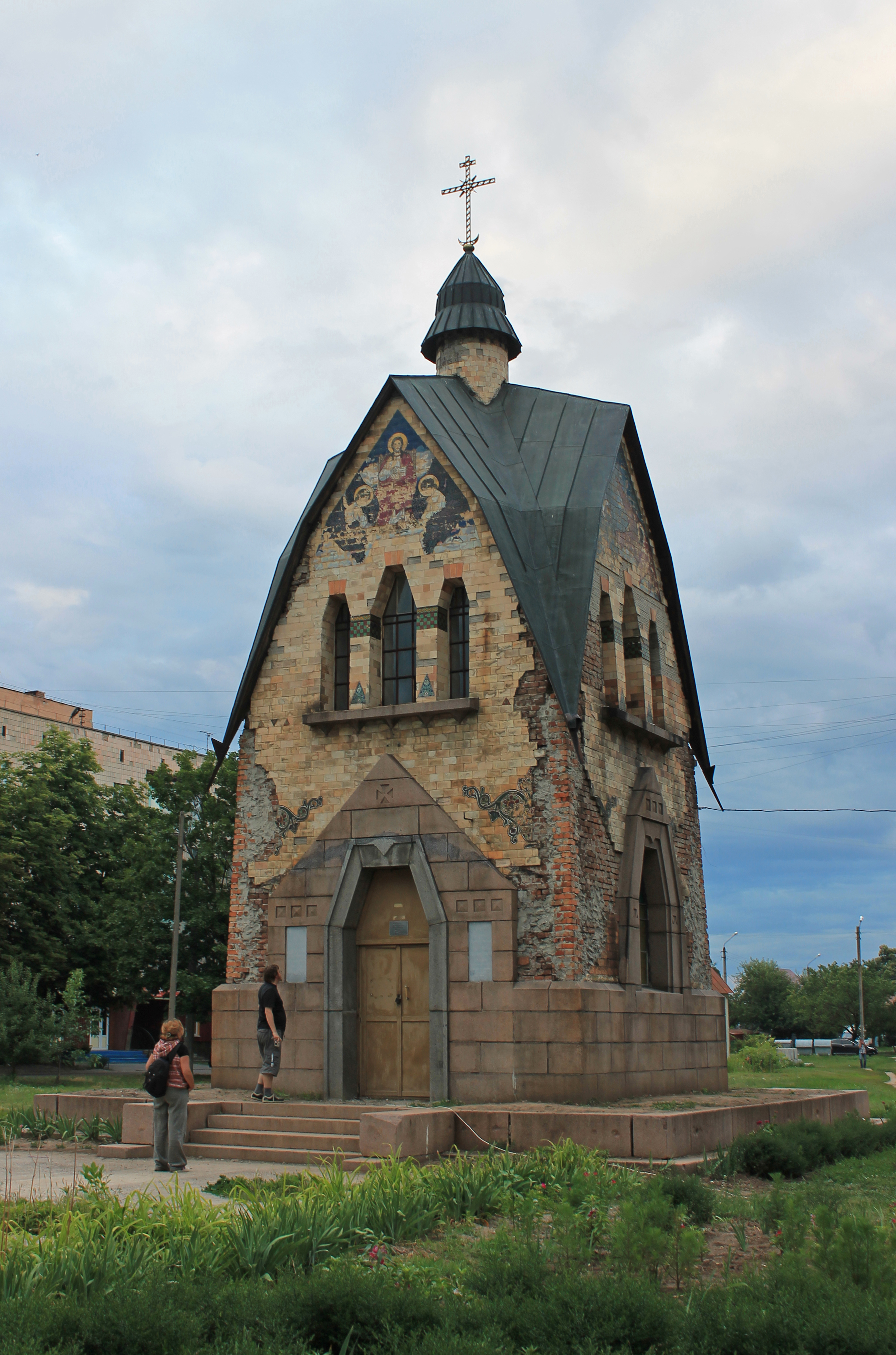 Капличка на місці селянського табору при святкування 200-річчя Полтавської битви 1914р. Архітектор І.Кальбус., вул.Зіньківська,16, м.Полтава